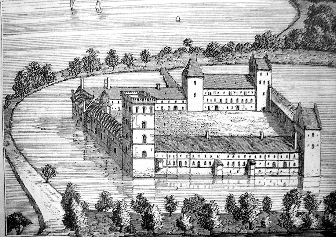 Aalholm i 1600-tallet